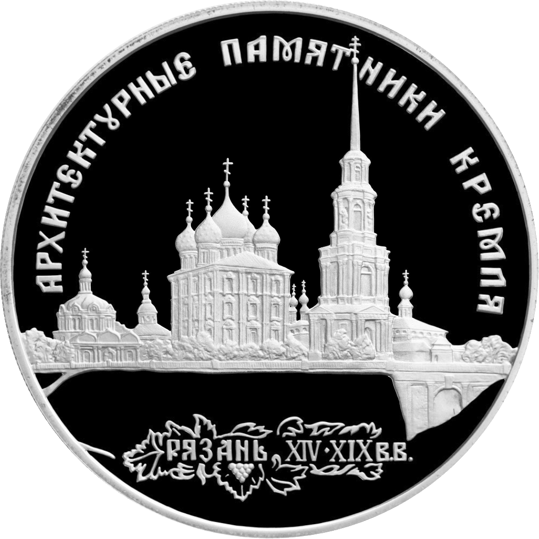 Монета Банка России — Серия: «Памятники архитектуры России», Архитектурные памятники Кремля в Рязани, 3 рубля, реверс.